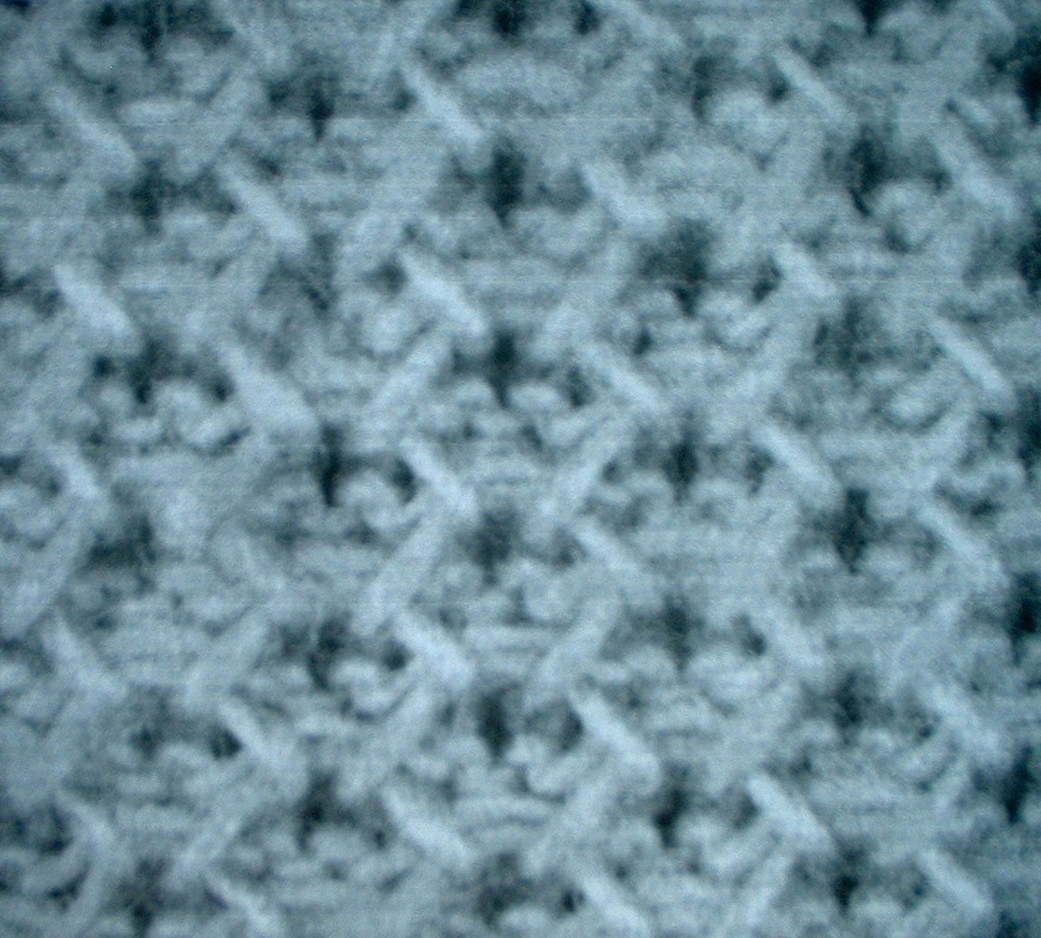 Fangbindung im Gestrick